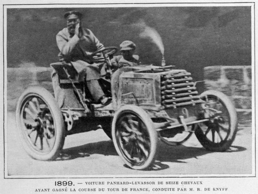 La Panhard et Levassor 16HP de René de Knyff, victorieuse du Tour de France 1899.